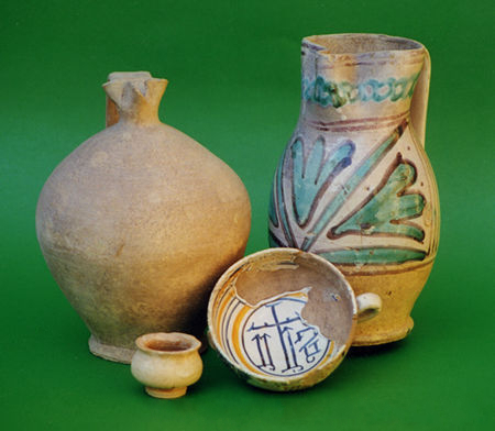 foto dal sito - inserita direttamente dal webmaster